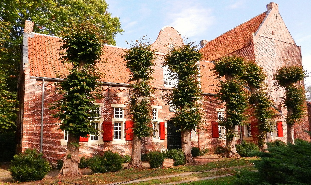 Südseite vom Steinhaus Bunderhee, Ostfriesland